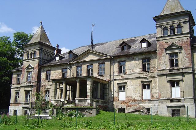 Pałac w Czerwięcicach